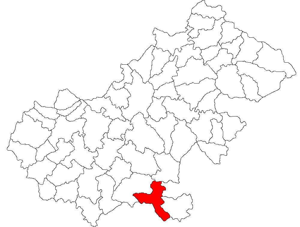 Categorie:Hărţi ale judeţului Satu Mare